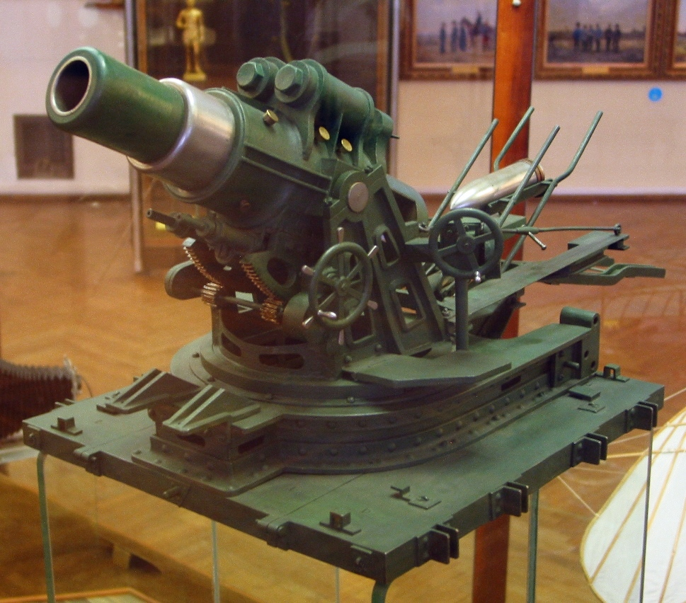 Modell der Škoda 305-mm-Haubitze Modell 1911